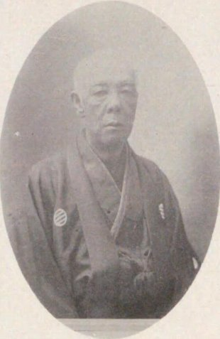 井島茂作（1855-1925）